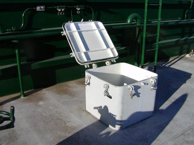 Tambucho de acceso a bodega.